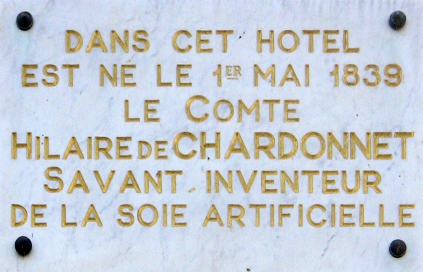 Plaque commémorative d'Hilaire de Chardonnet située place Jean Cornet à Besançon (Doubs, France).